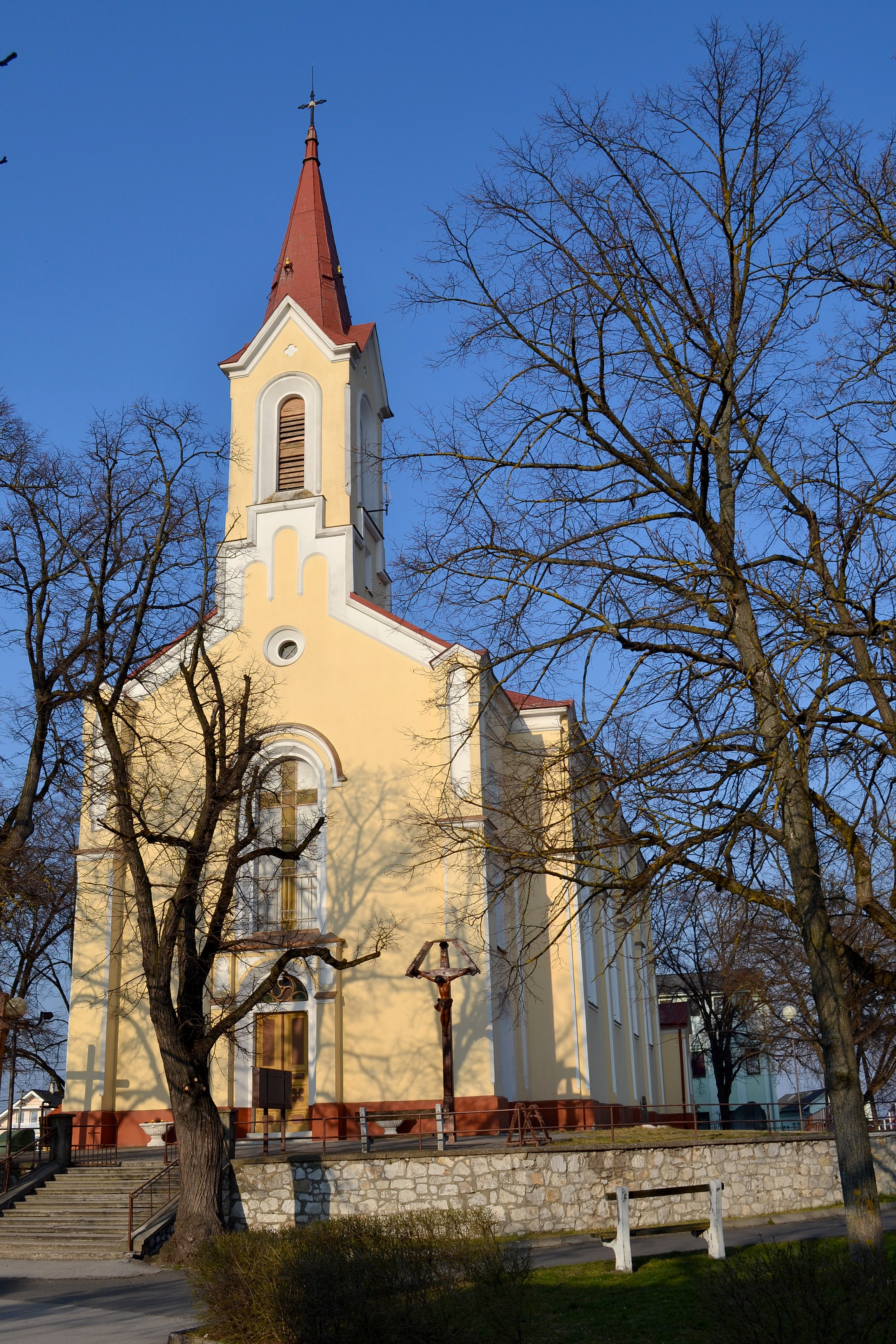 Rohožník. Farský Kostol Nanebovzatia Panny Márie z rokov 1857 až 1860